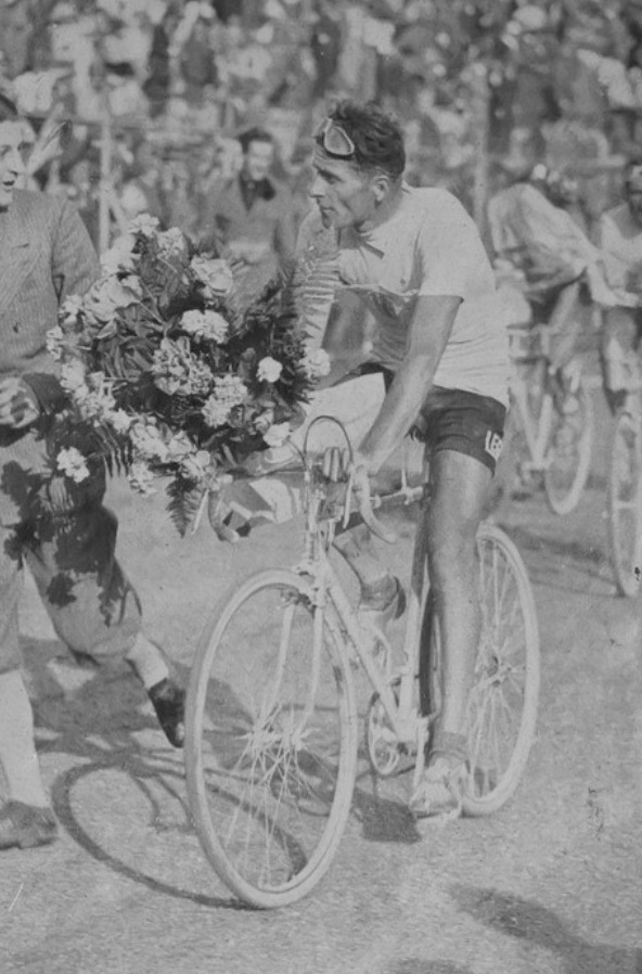 Il ciclista Alfredo Binda vincitore del Giro d'Italia 1933 al giro d'onore nell'Arena Civica di Milano (28 maggio 1933) Tratto da "Lo sport fascista" n. 6, 1933